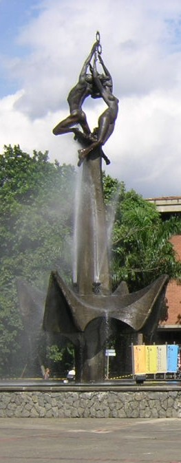 El Hombre Creador obra de Rodrigo Arenas Betancur, Universidad de Antioquia. Medelln.Colombia